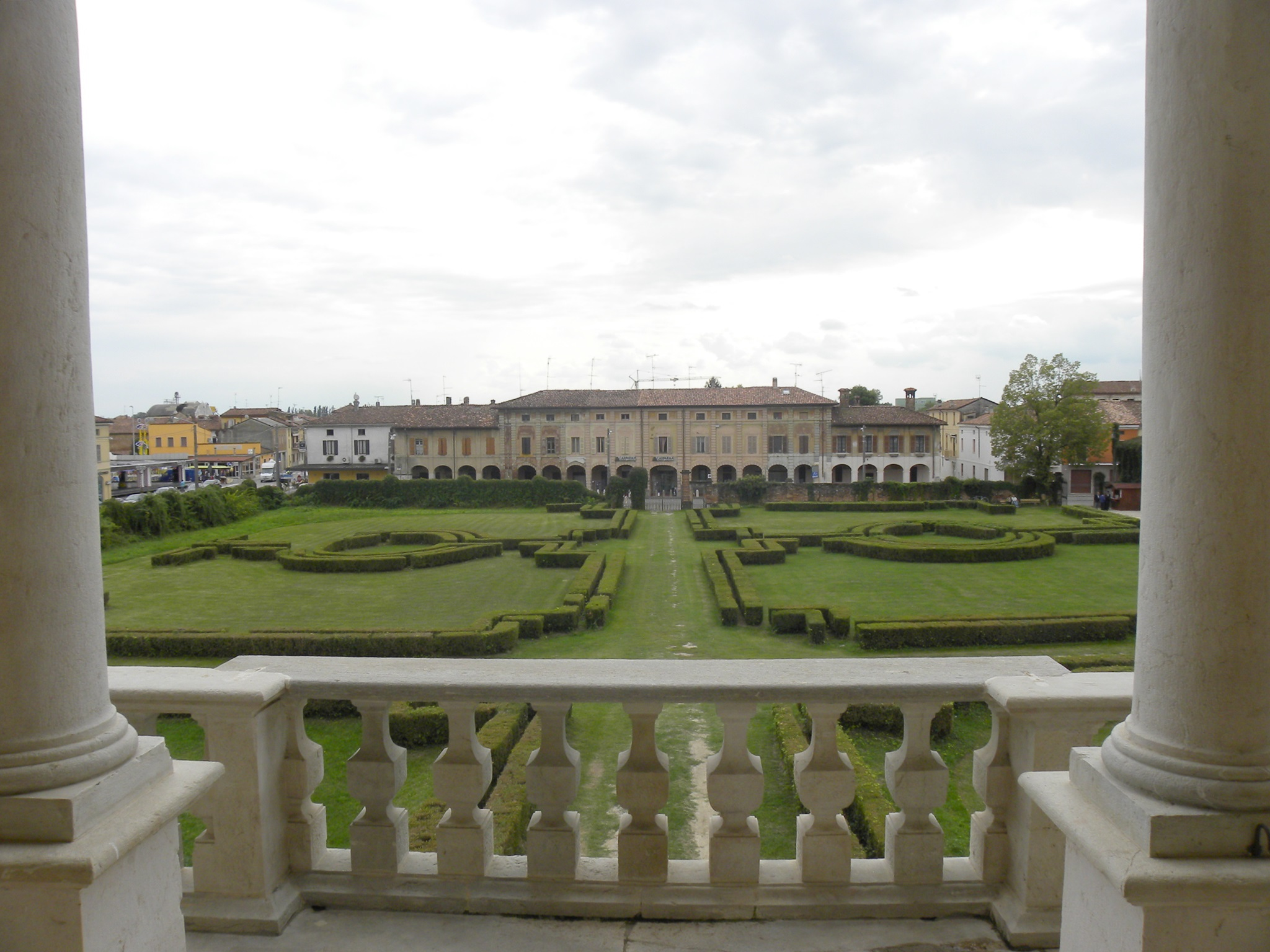 il giardino all'italiana visto dal balcone di villa Medici del Vascello